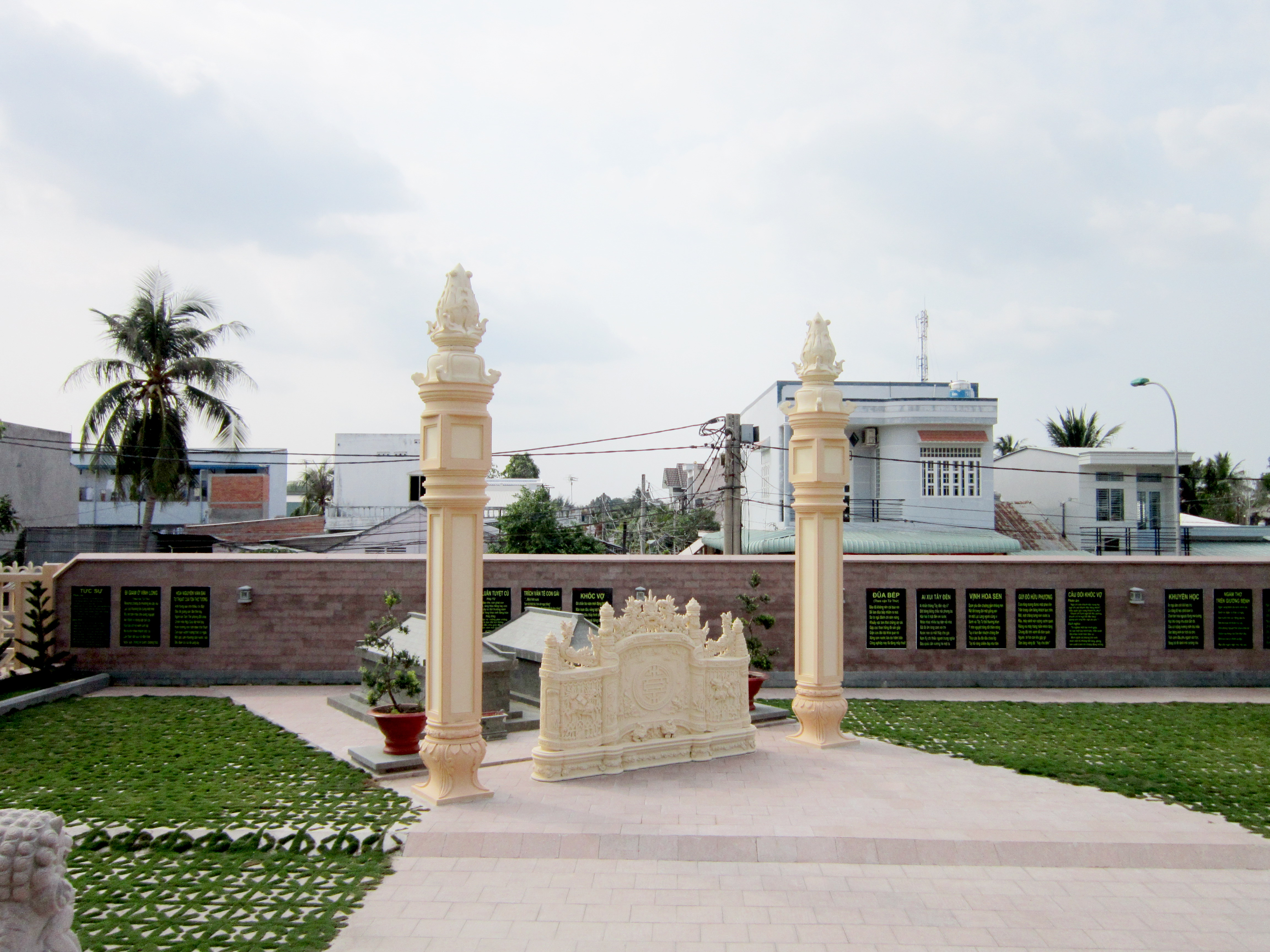 Mộ nhà thơ Bùi Hữu Nghĩa (1807 - 1872) và vợ trong khu tưởng niệm ông, nằm trên đường Huỳnh Mẫn Đạt; thuộc phường Bùi Hữu Nghĩa, quận Bình Thủy, thành phố Cần Thơ, Việt Nam. Ghi chú: Khi chụp ảnh này, trong ngôi mộ của vợ ông chưa có hài cốt.